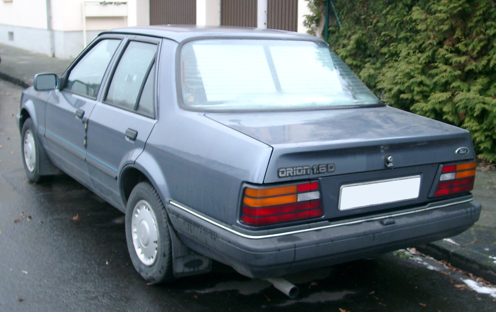 Ford Orion 1.6D